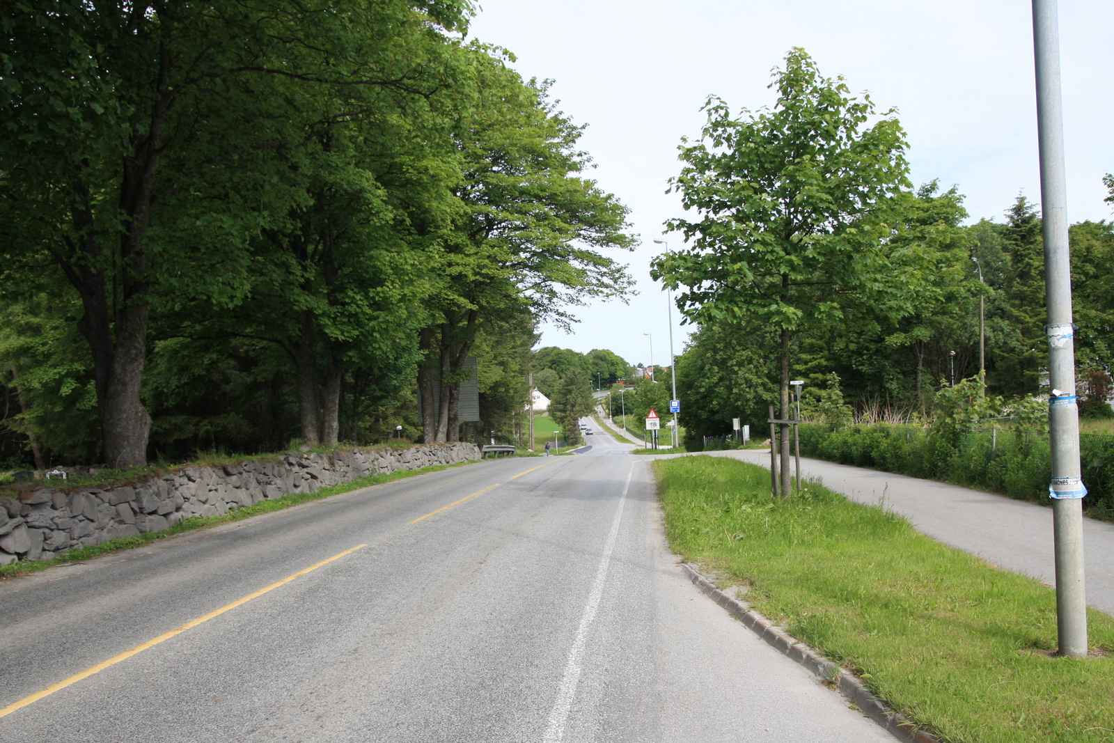 Fylkesvei 509 Sandnesveien Retning krysset FV 329